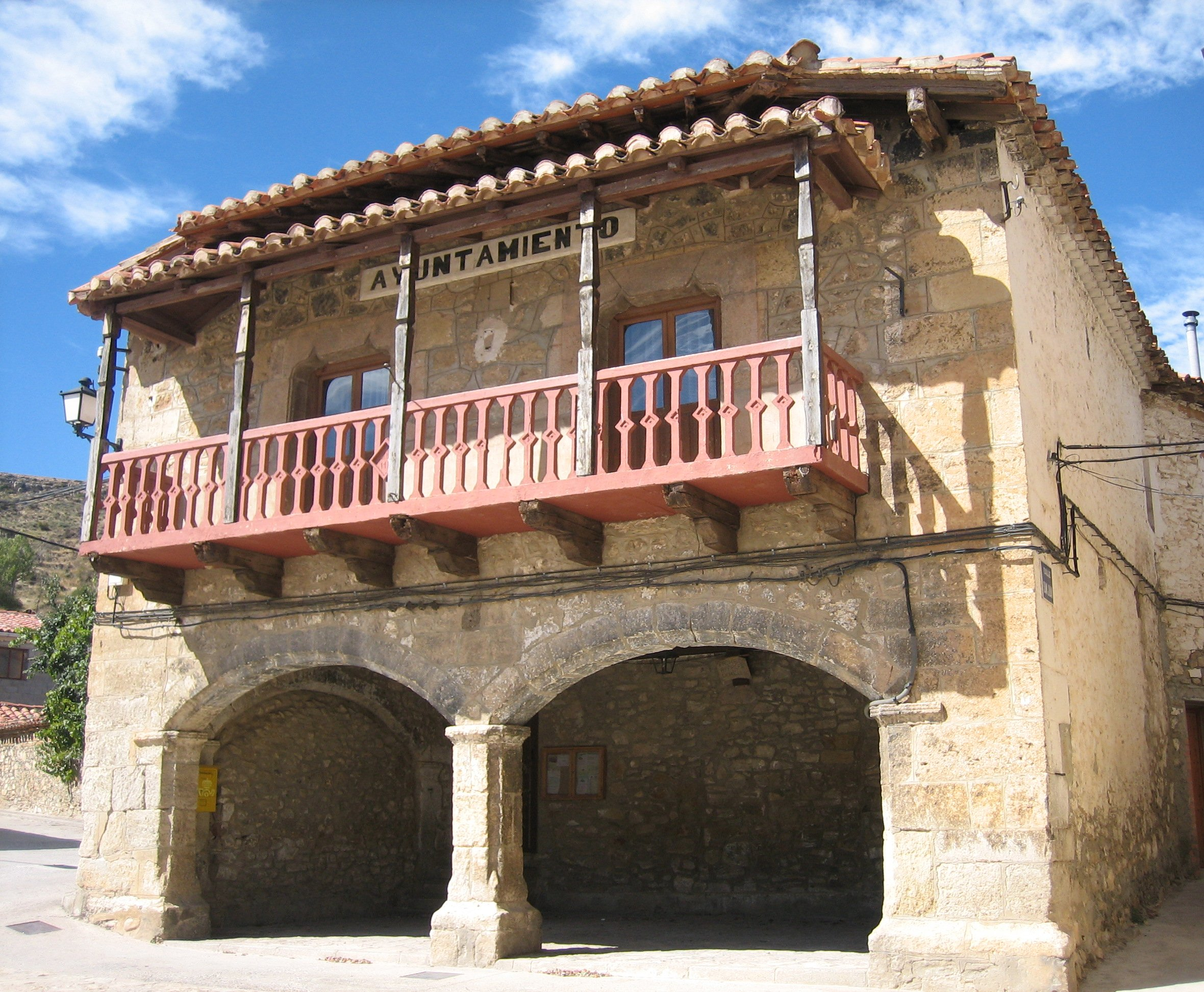 Casa consistorial de Terriente (Teruel, España)